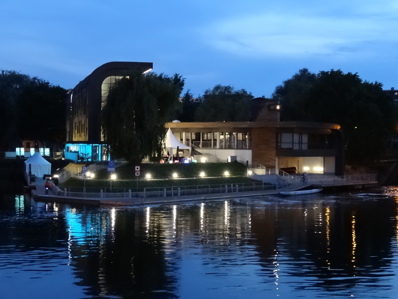 Przystań Bydgoszcz na Wyspie Młyńskiej